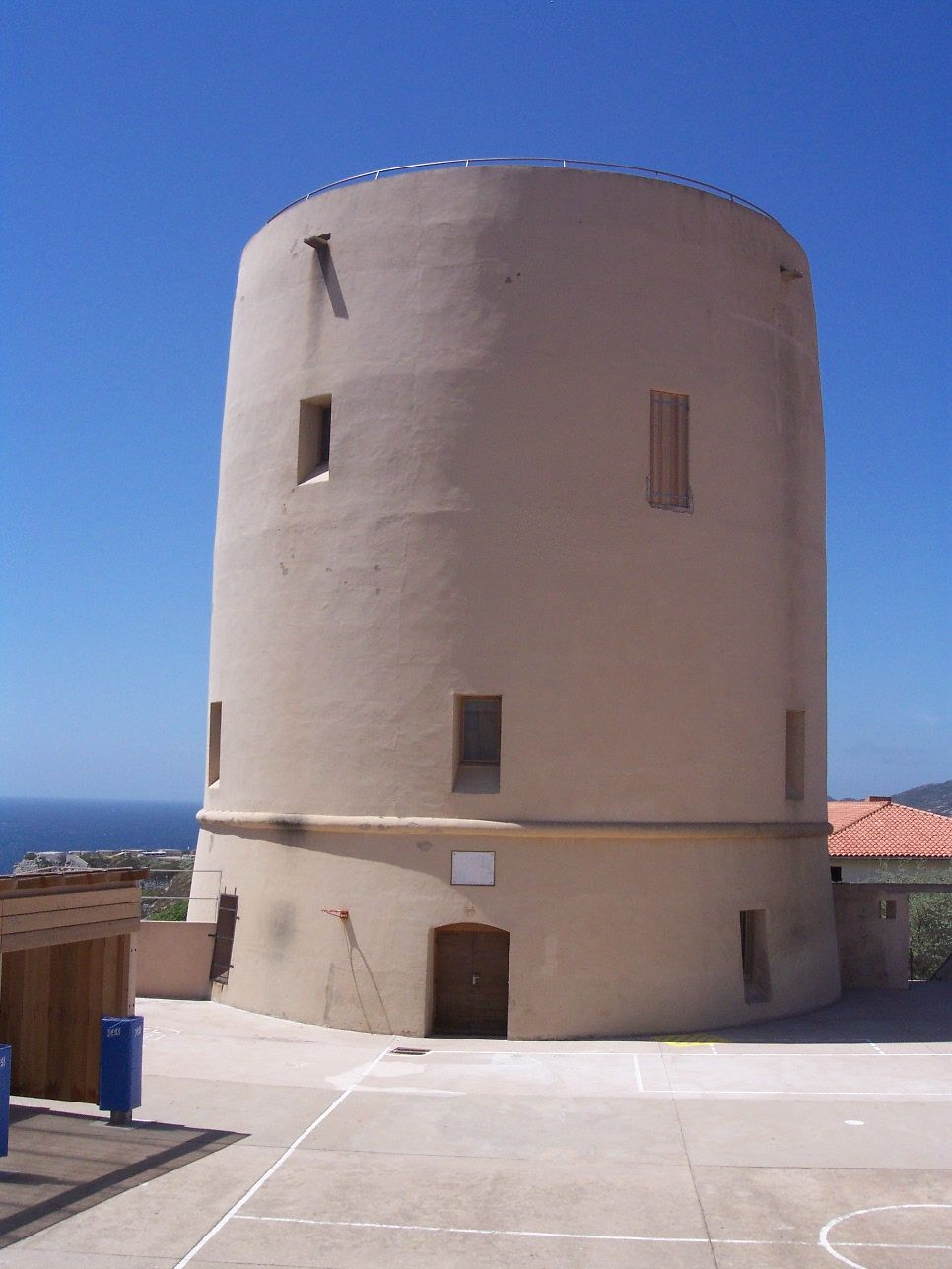 Bonifacio (Corse) - Torrione, première tour de guet de Bonifacio. Détruit en 1901, il est rebâti en 1984